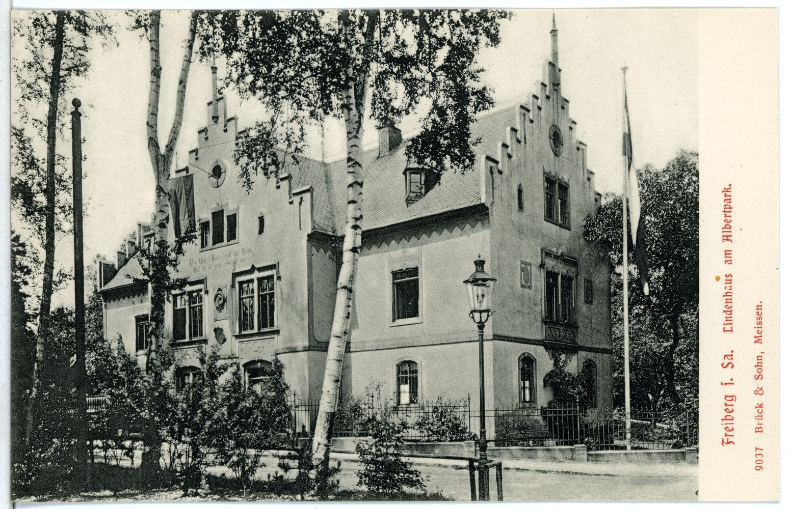 Freiberg; Lindenhaus am Albertpark This postcard is from publisher Brück & Sohn in Meißen ( postcard has a unique number 09037 and is available in a higher resolution at the publisher. This images was uploaded in a cooperation project between Wikipedians and the publisher.